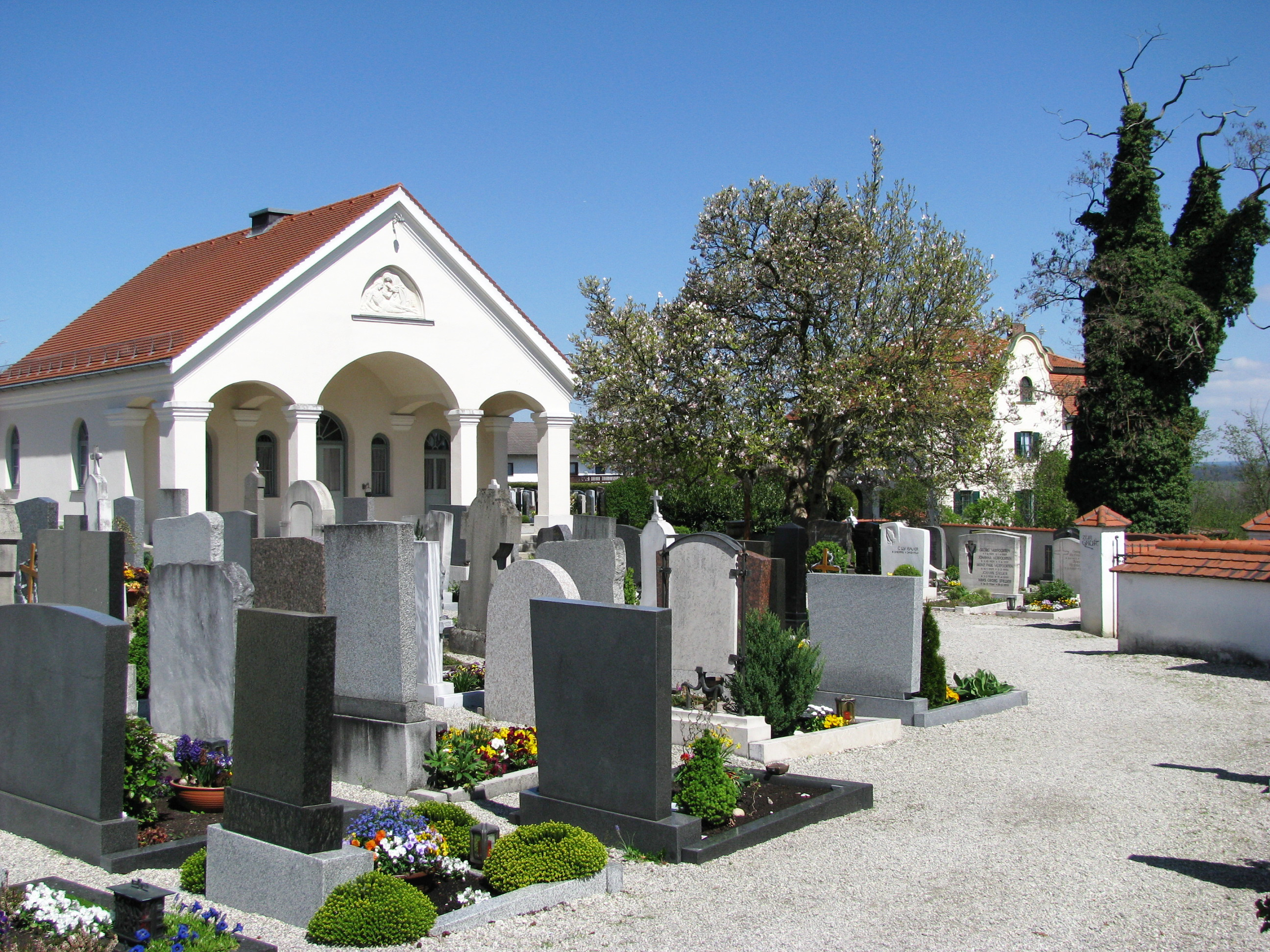 Friedhof von Rott am Inn, alter Teil, auf dem ehemaligen Klosterareal.